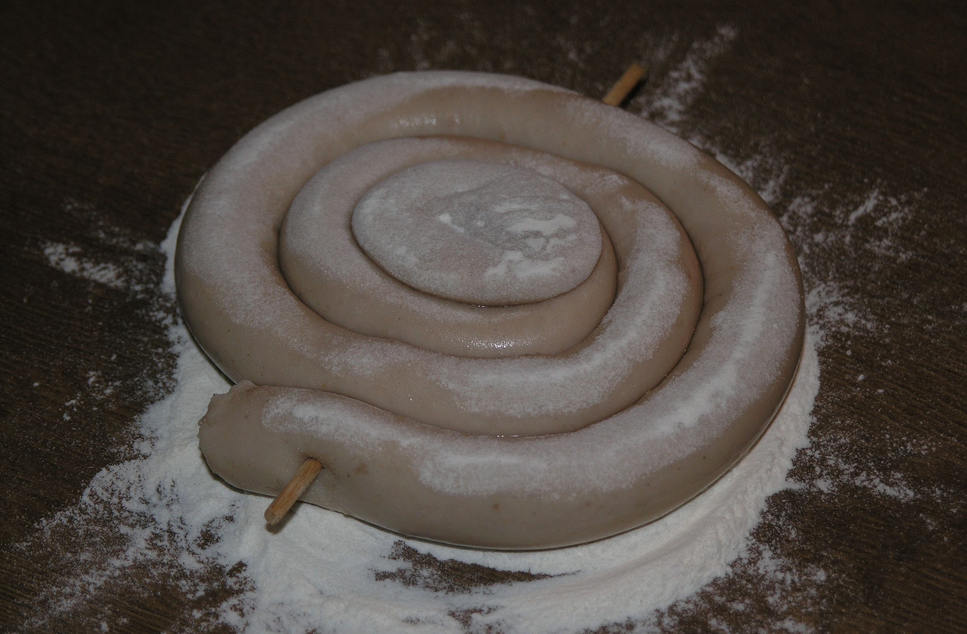 Vinná klobása